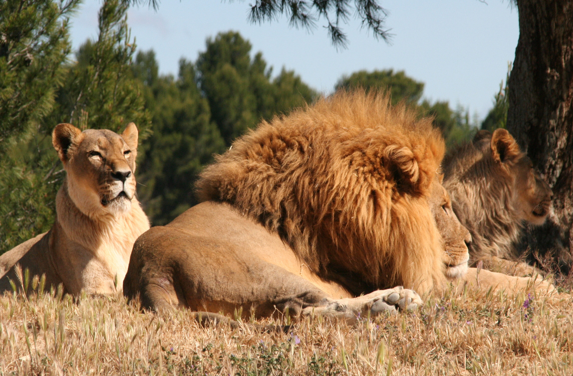 Das Löwengehege in der 'Réserve Africaine de Sigean'